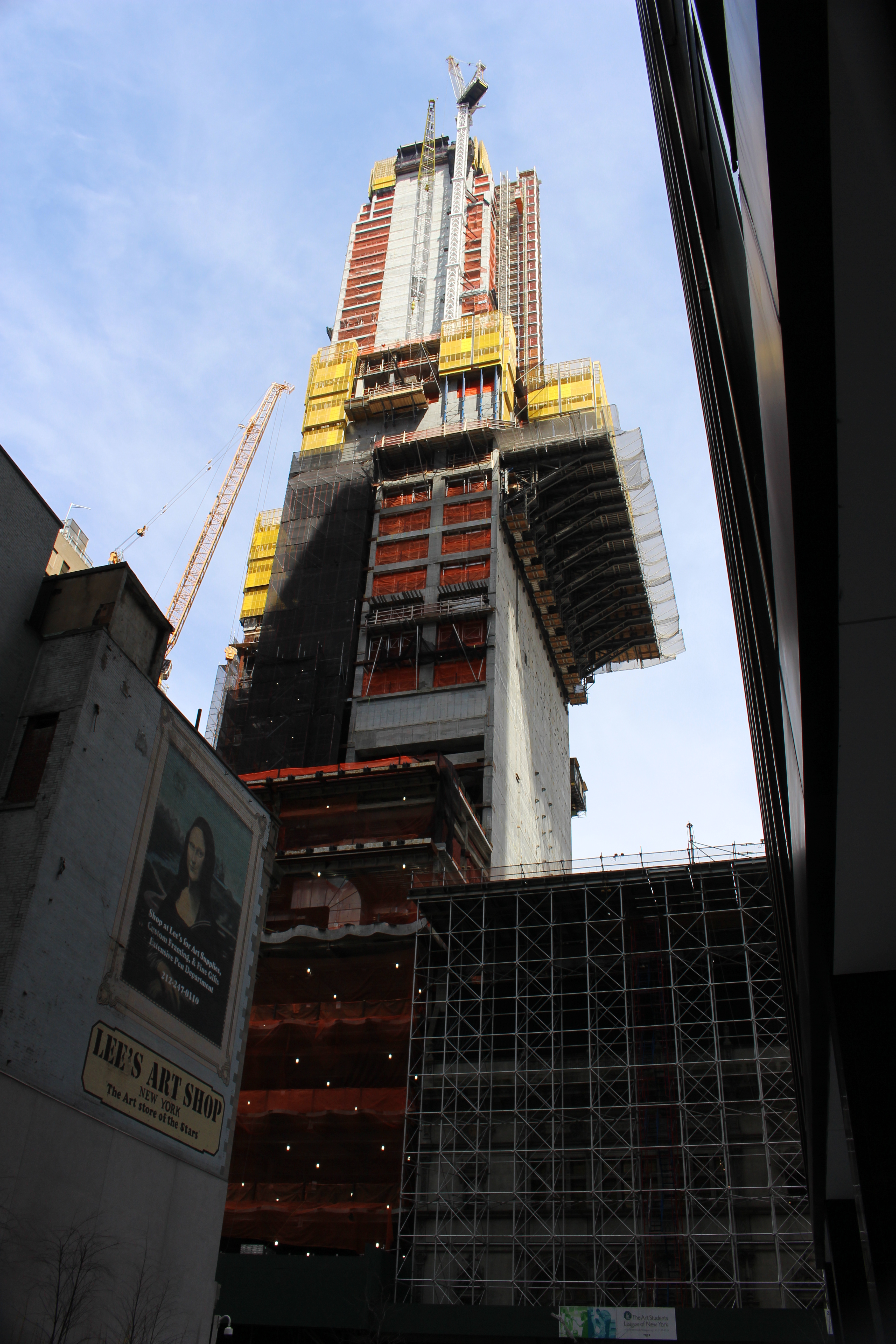 Der Turm am 10.04.2017